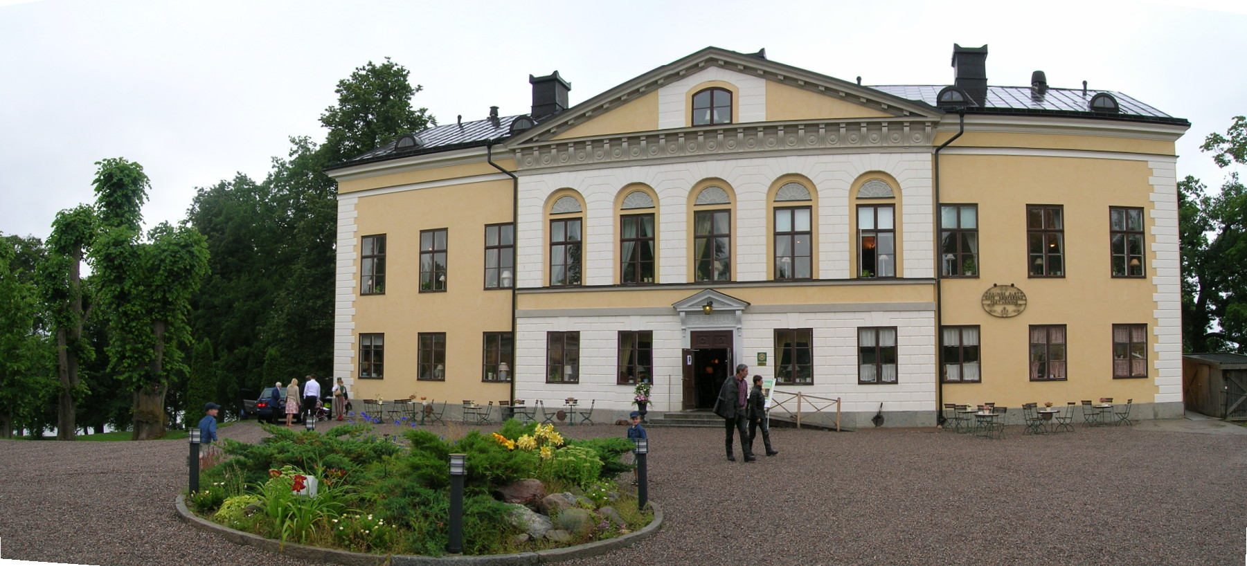 Taxinge-Näsby slott, framsidan, Taxinge, Nykvarns kommun, Sverige